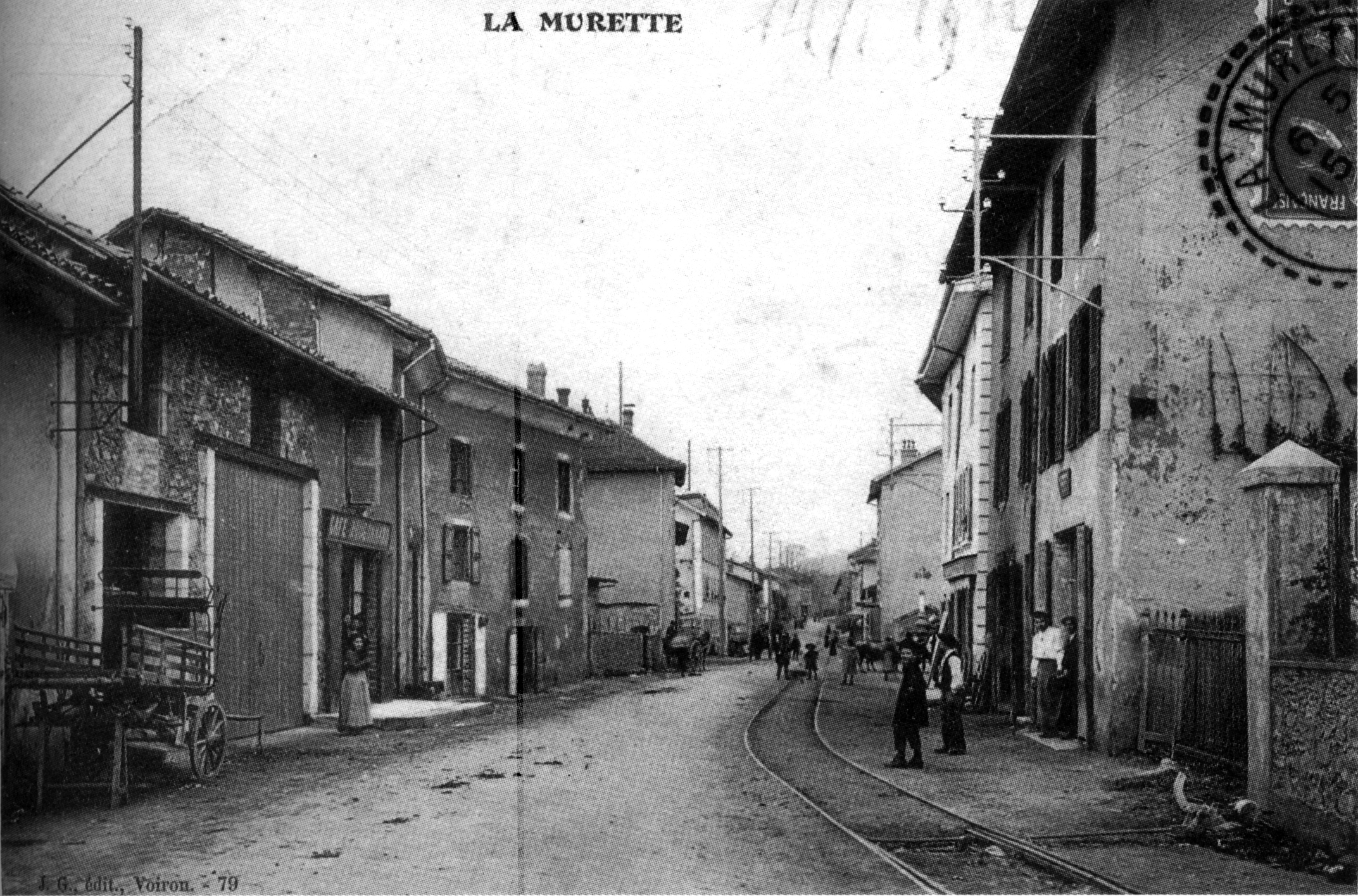 La Murette en 1908